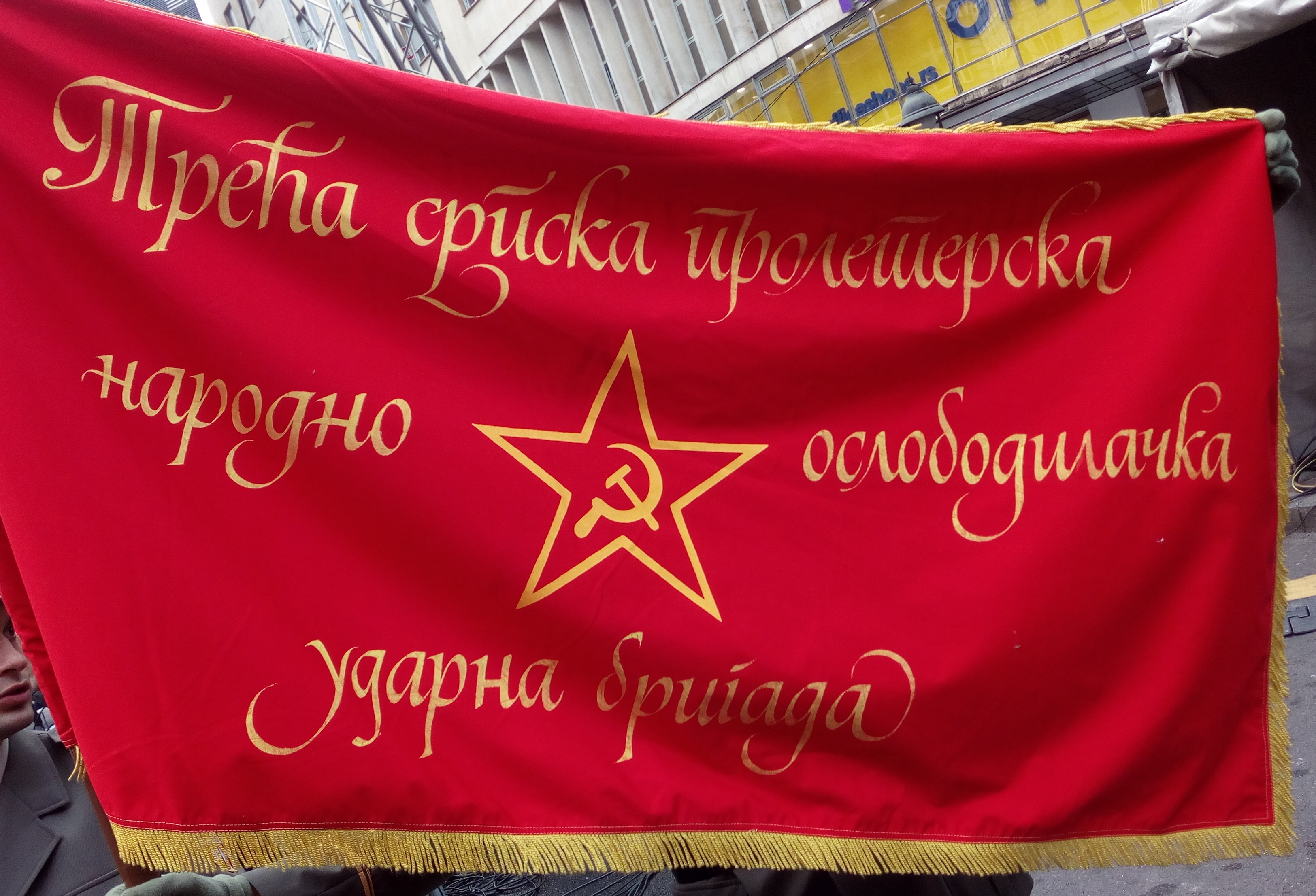 Zastava Treće srpske proleterske narodnooslobodilačke udarne brigade